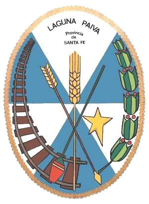 Laguna Paiva